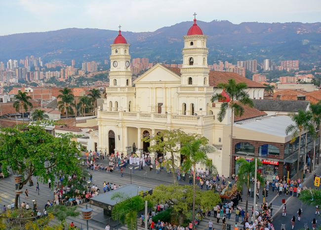 Iglesia y parque principal